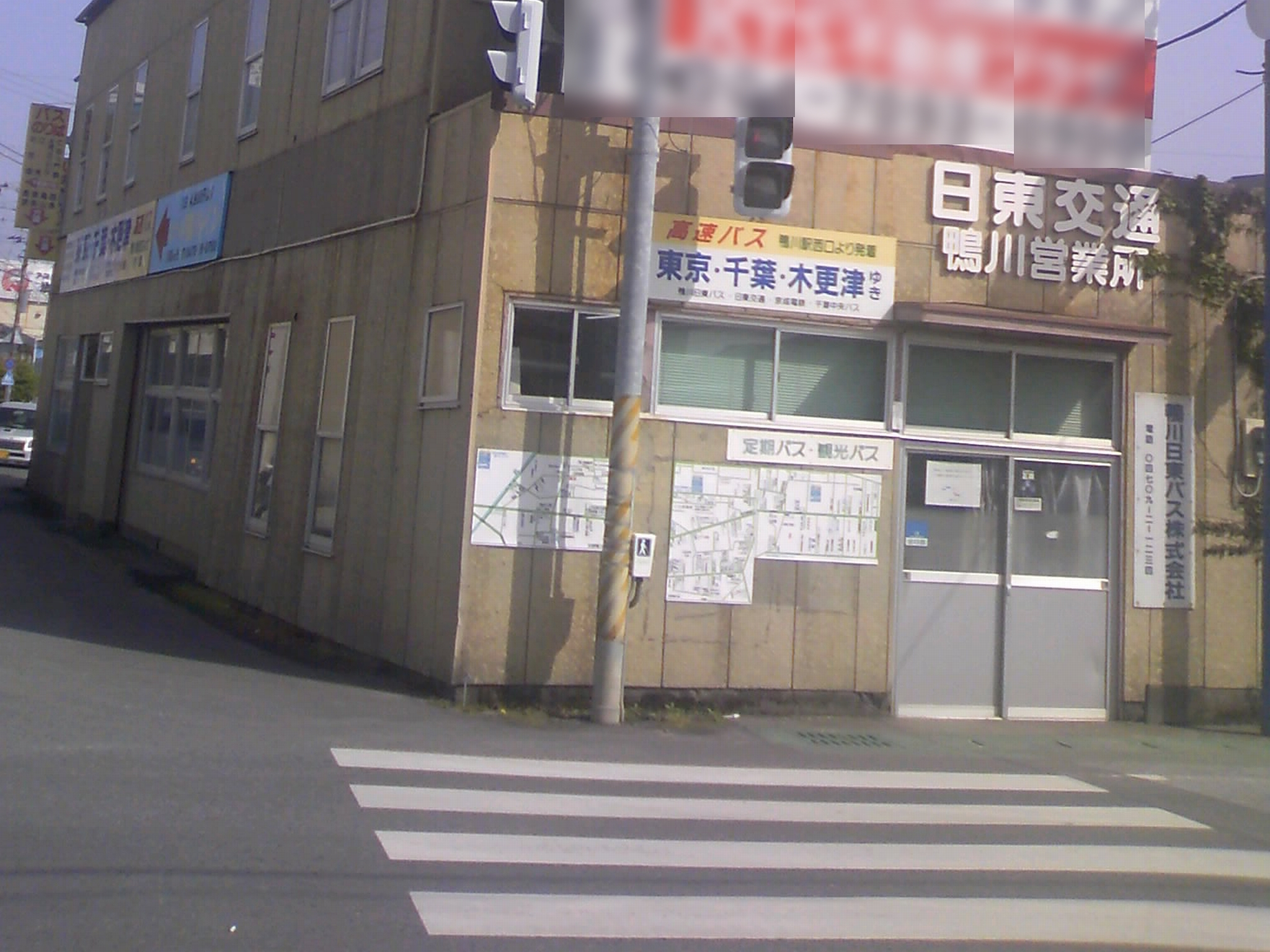 日東交通鴨川運輸営業所（鴨川日東バス本社営業所併設）